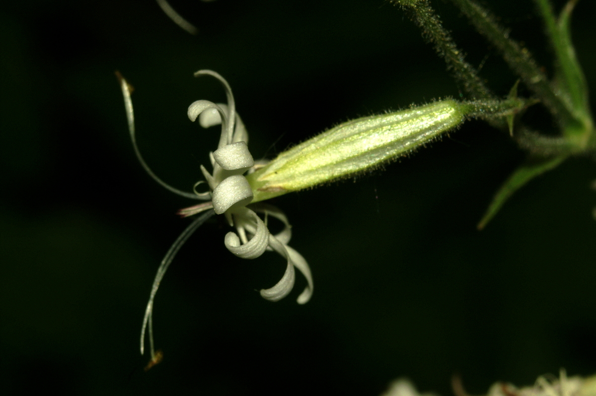 Kimasta lepnica v Polhovem Gradcu